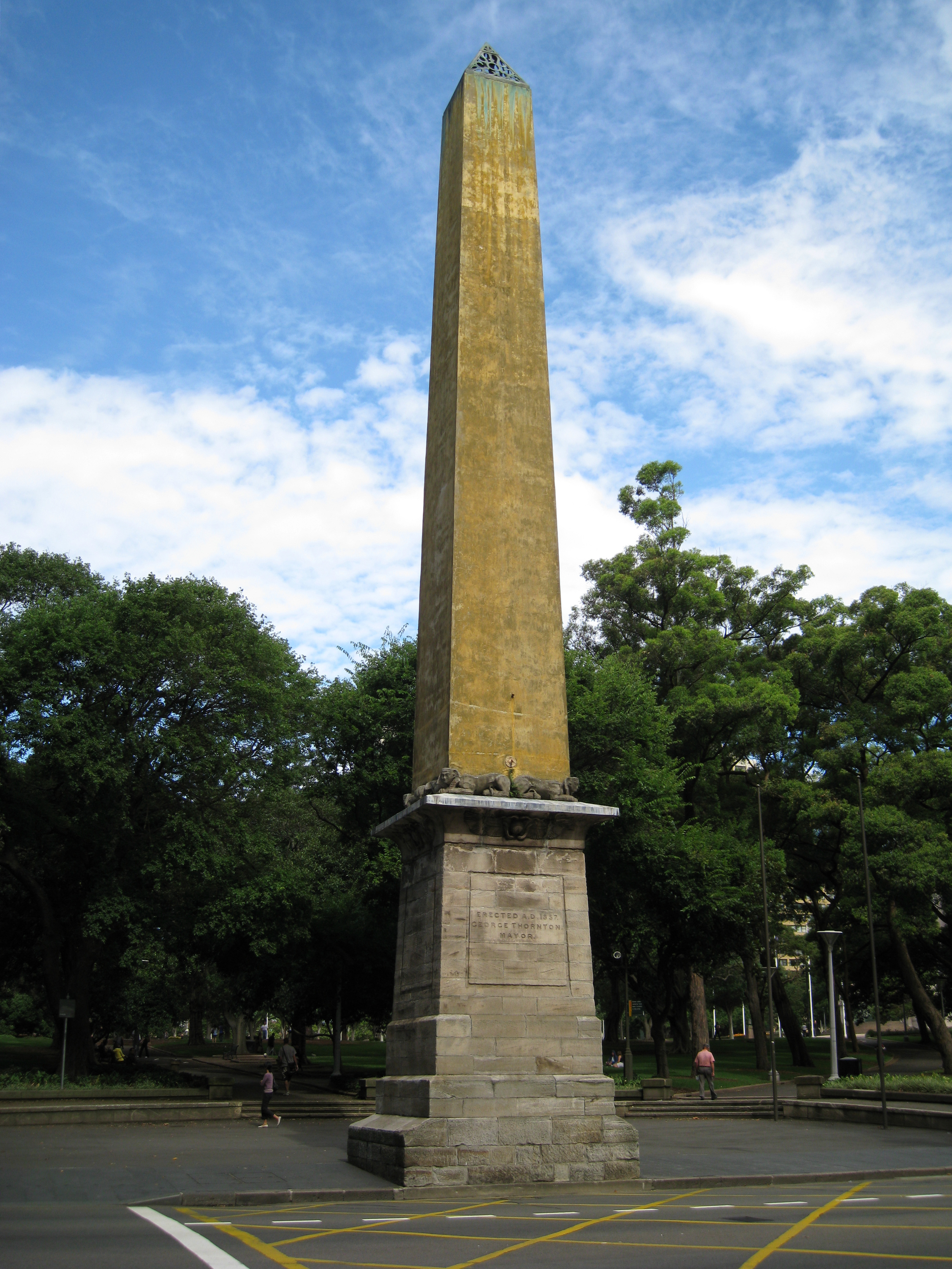 Hyde Park Obelisk